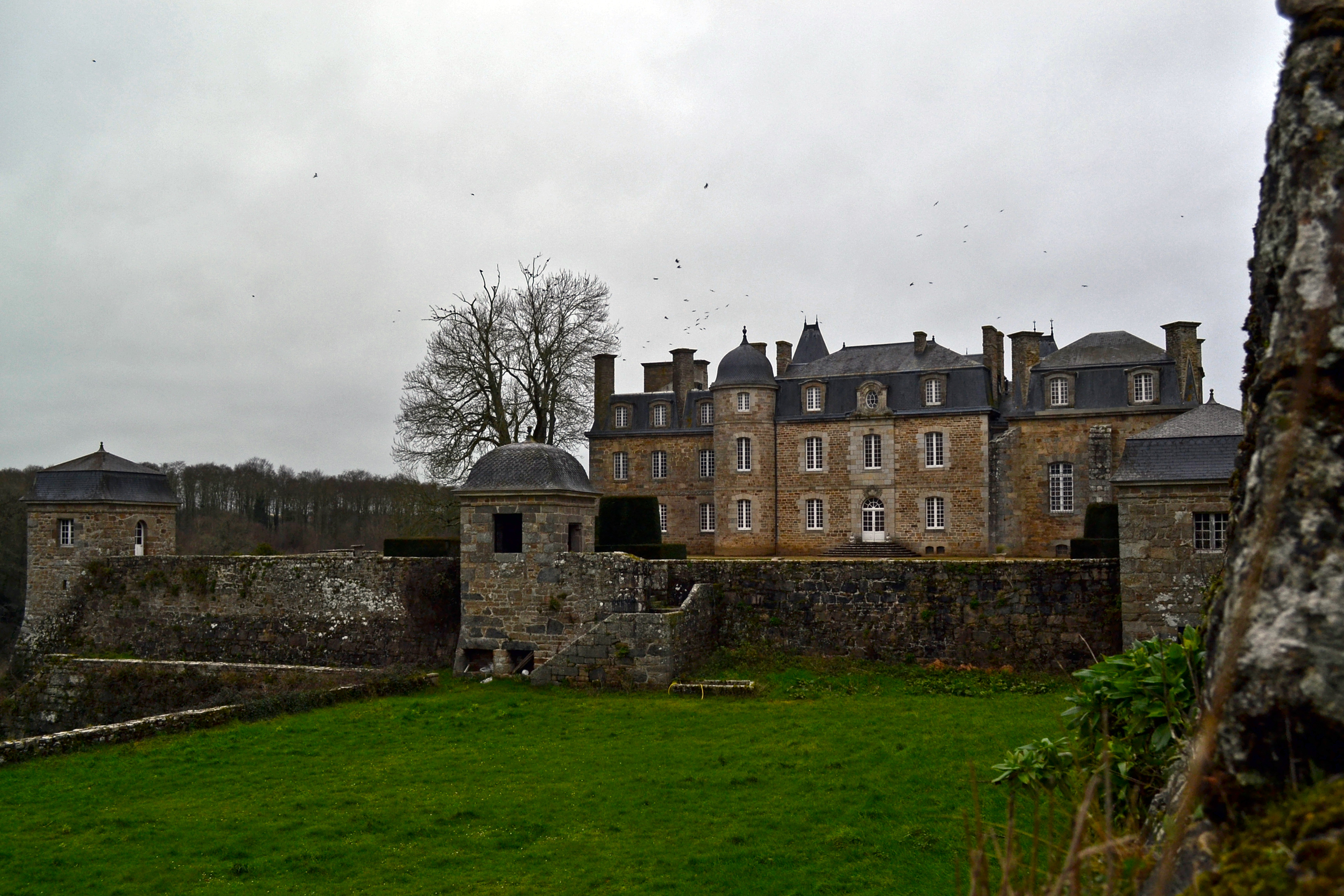 Château de Rosanbo à Lanvellec dans le pays du Trégor (Côtes d'Armor).